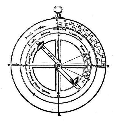 Un « horologium » ressemblant à un astrolabe nautique.